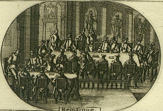 Carte du Gouvernement civil de l´Espagne et de tous les Conseils Souverains de la cual se desconoce con exactitud la datación y autoría